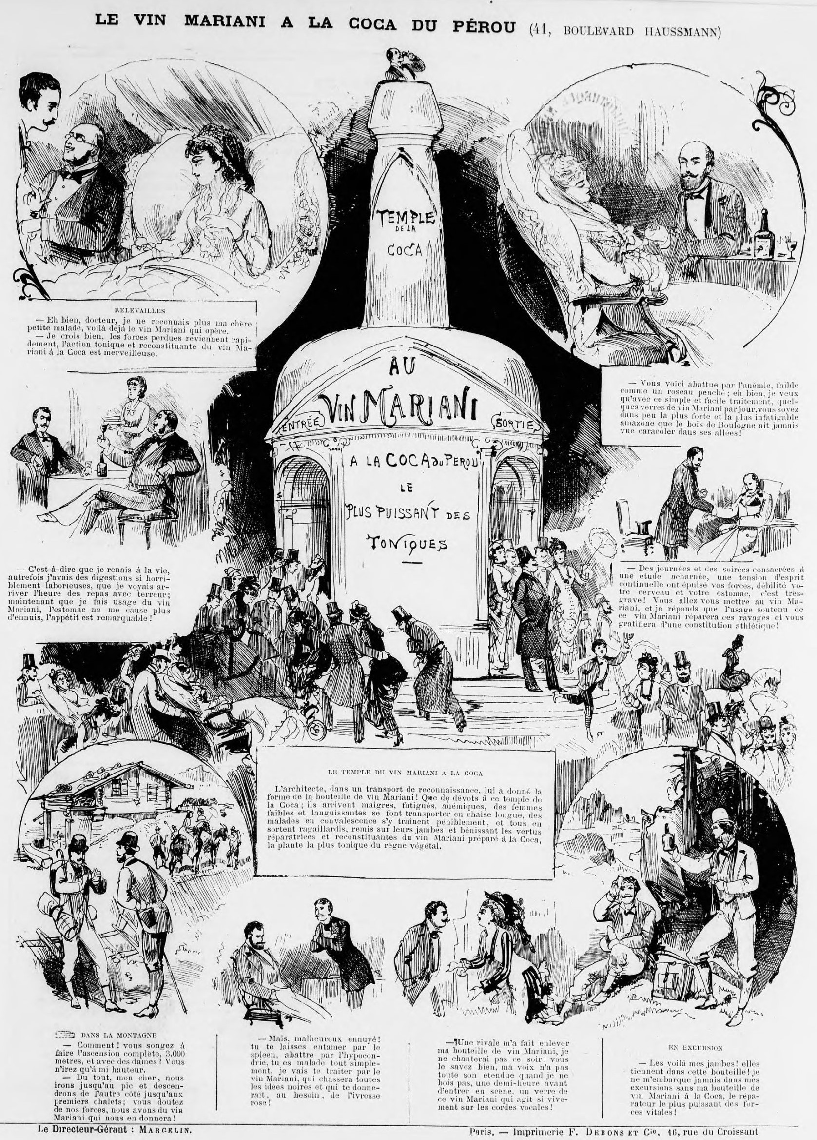 Page publicitaire pour le vin Mariani dans la Vie parisienne du 31 mars 1877. Dessins d'Albert Robida